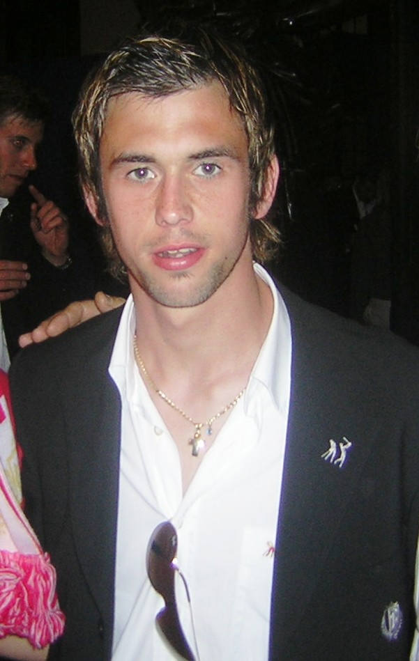 Steven Defour lors de la parade du Standard du 6 mai 2008